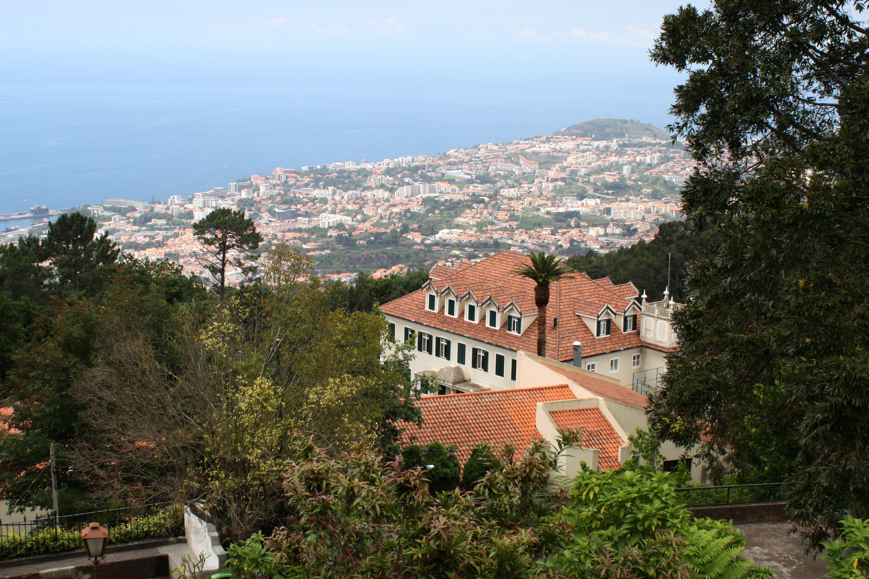 Monte - Colégio Infante